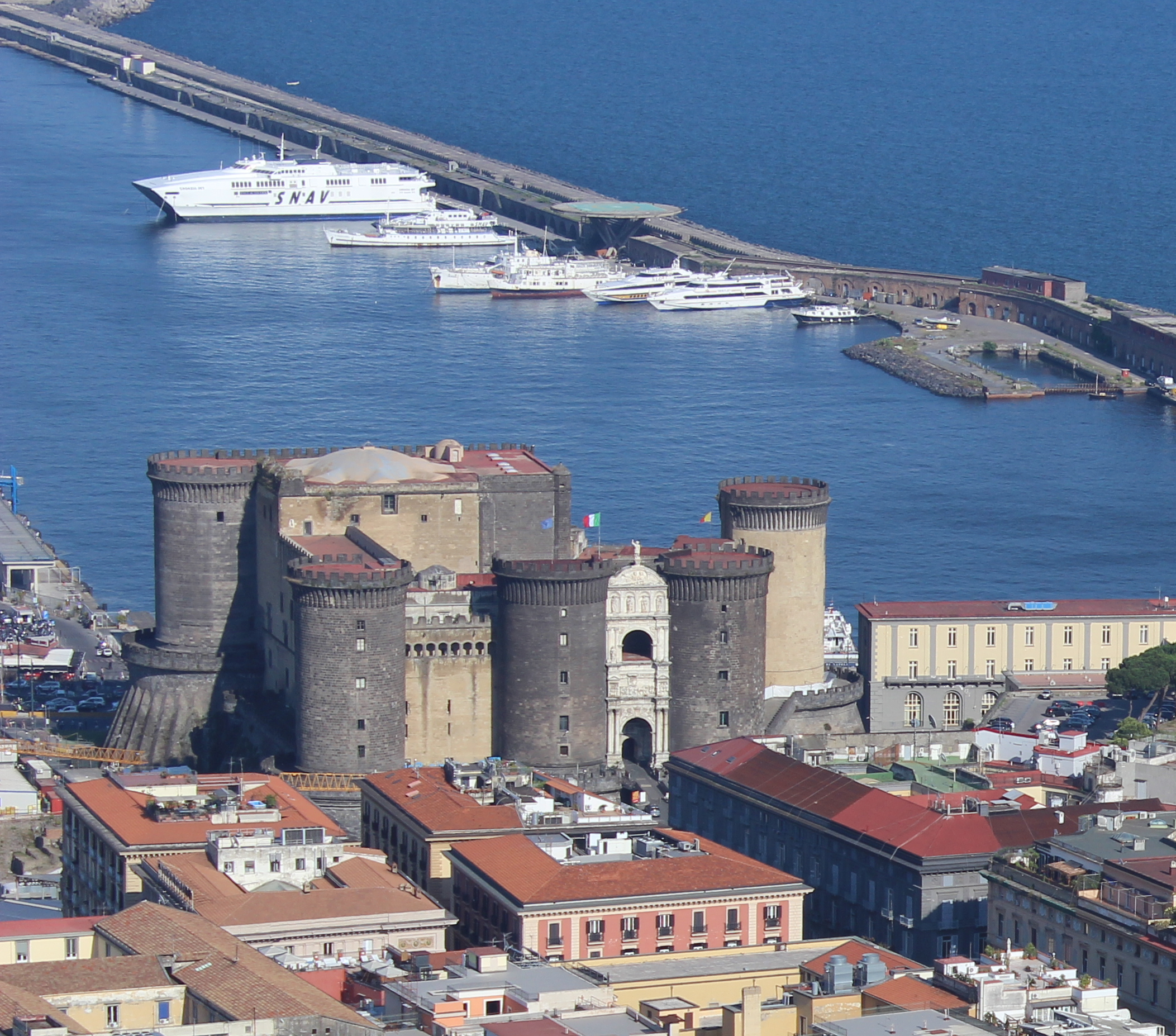 Nápoles, vista de la Galleria Umberto I y del Castel Nuovo desde la Certosa di San Martino.